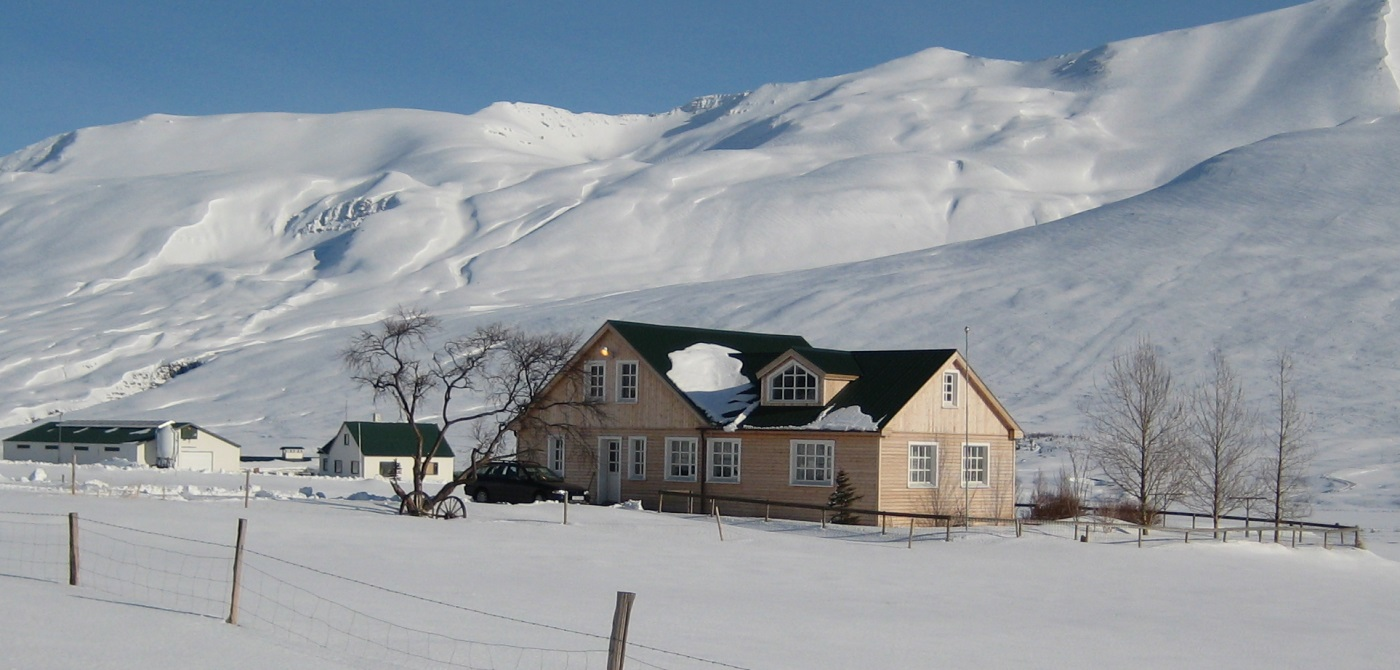 Þverá í Svarfaðardal, Dalvíkurbyggð. Steindyr fjær